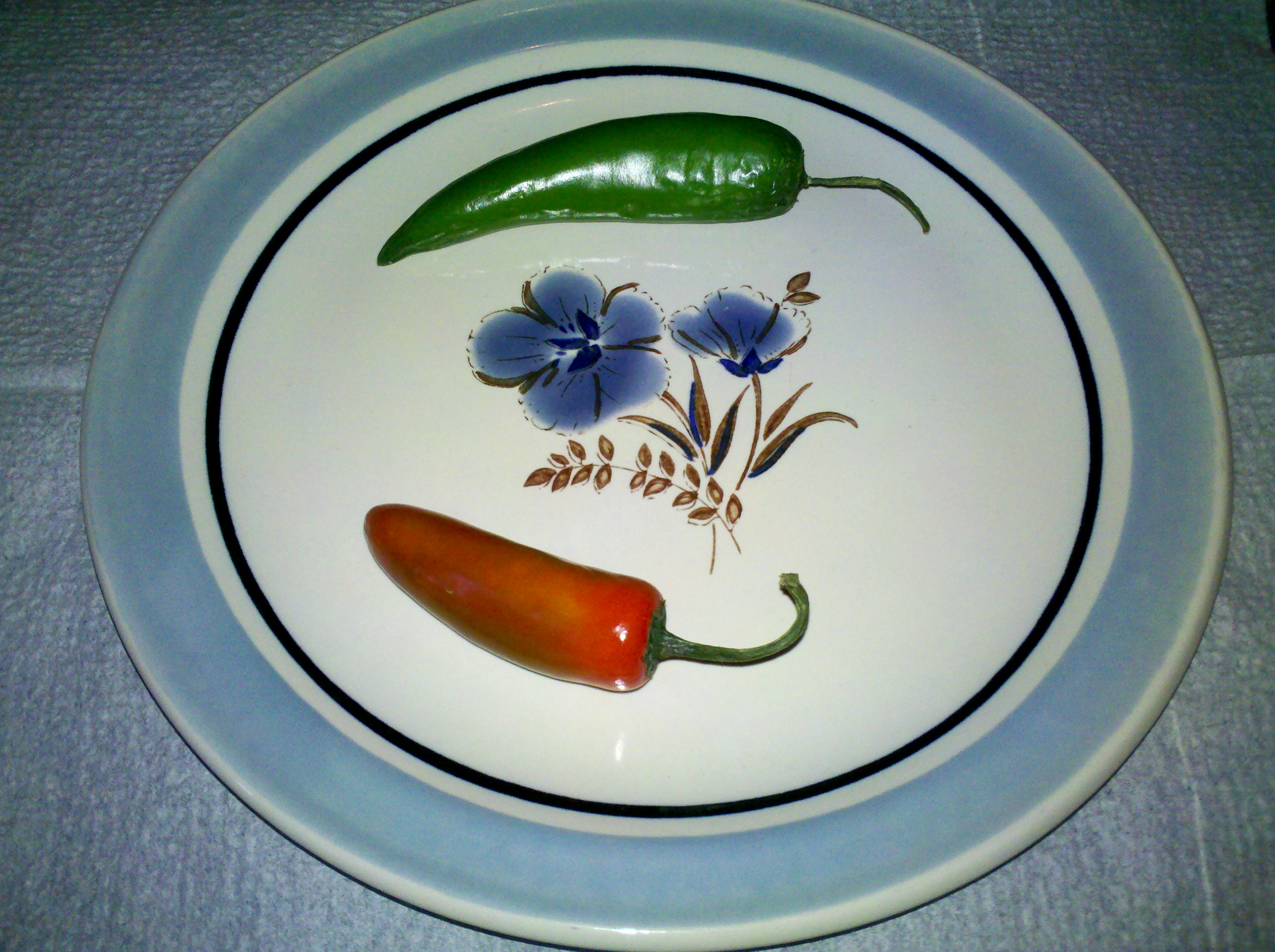 Chiles serranos.